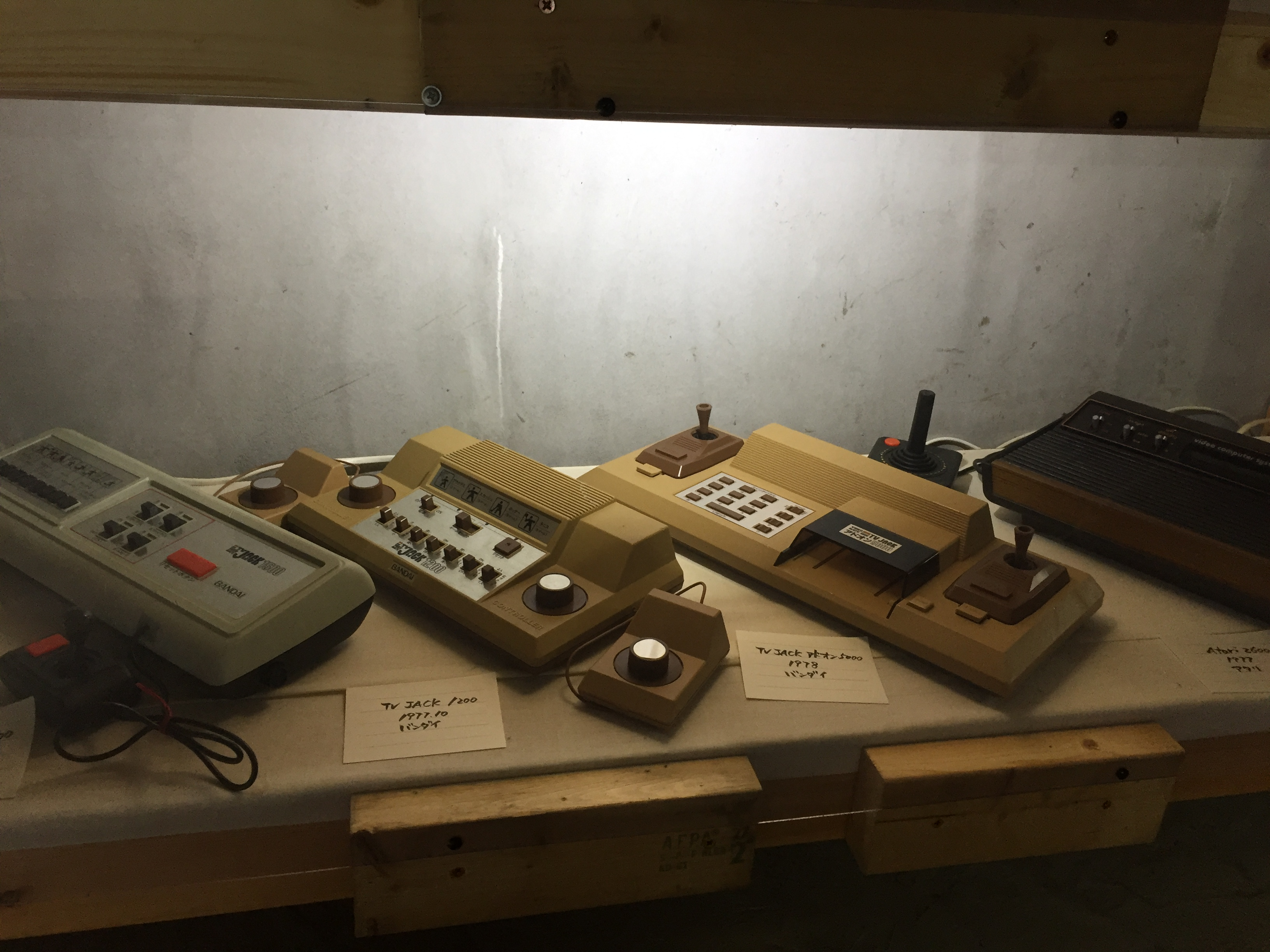 バンダイ TV JACK シリーズ。左からTV Jack 1500、TV Jack 1200、TV Jack アドオン5000。JARGA（日本レトロゲーム協会）所蔵